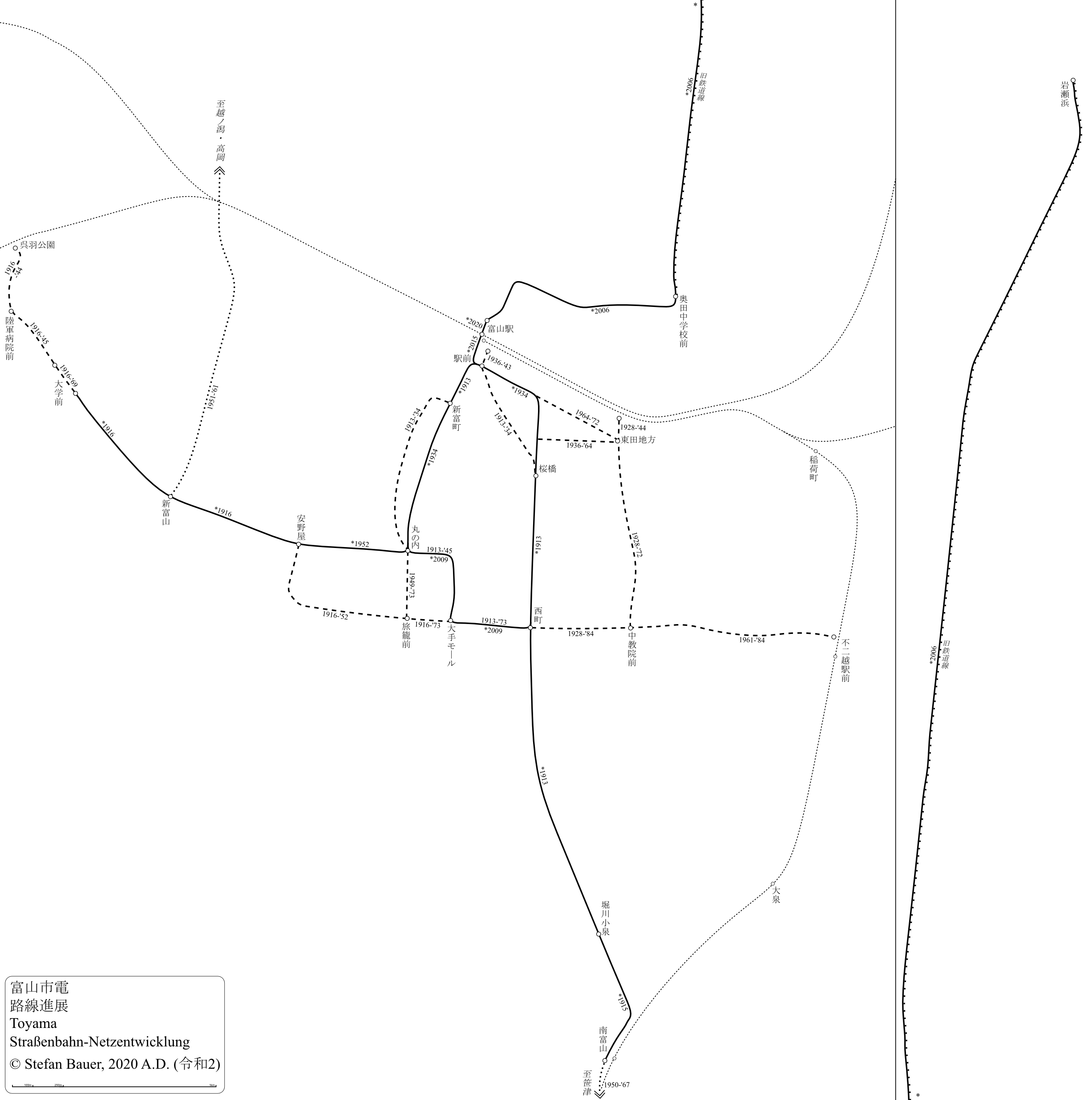 富山市電の路線進展図